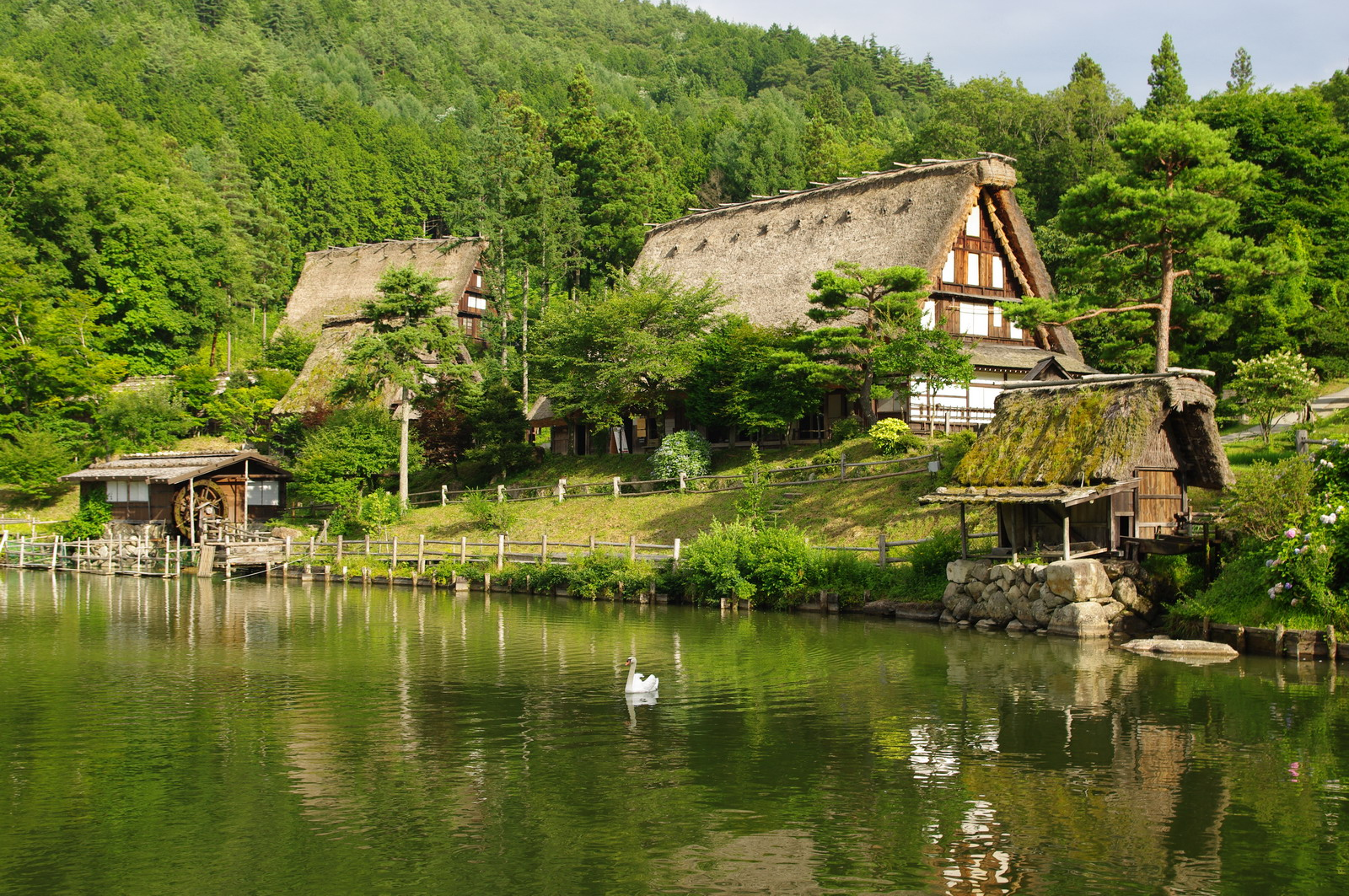 Museumsdorf Hida no sato